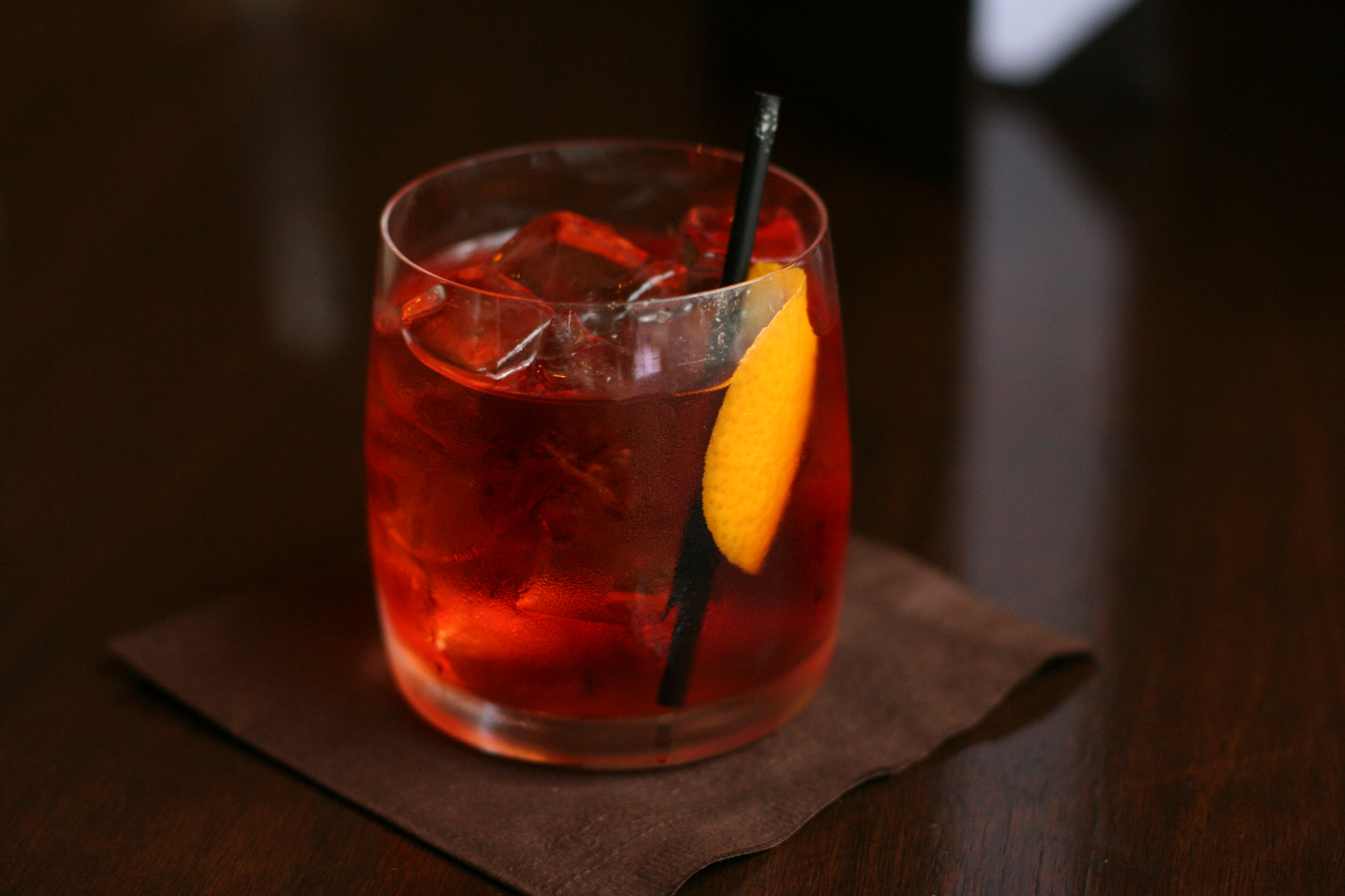 A Negroni.